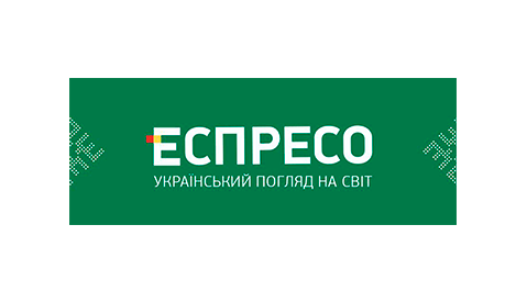 Логотип телеканалу з 2018 року